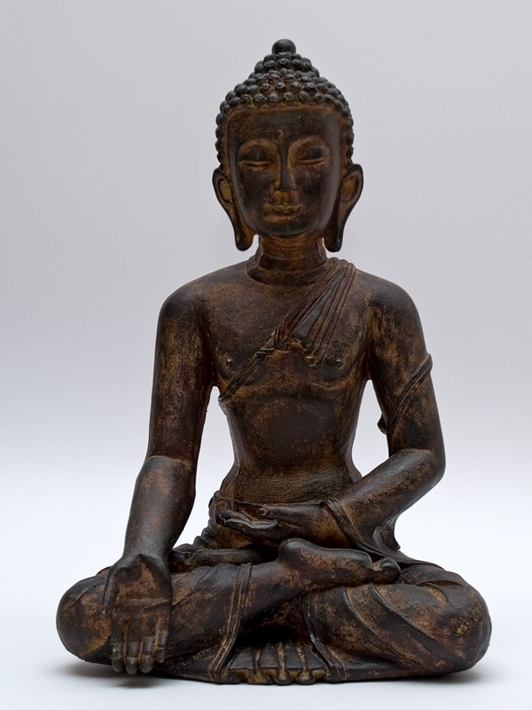 Buddha, Varada mudra